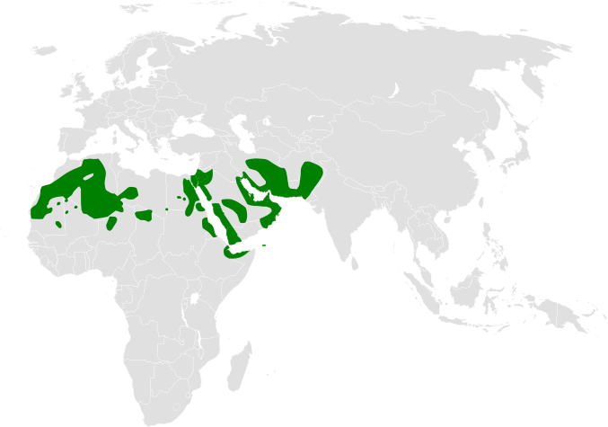 Ptyonoprogne obsoleta distribution map, based on